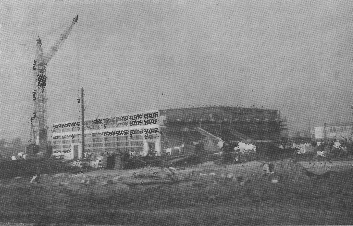 Budowa Wytwórni Prefabrykatów Wielkowymiarowych PPB Nr 2 - 1966